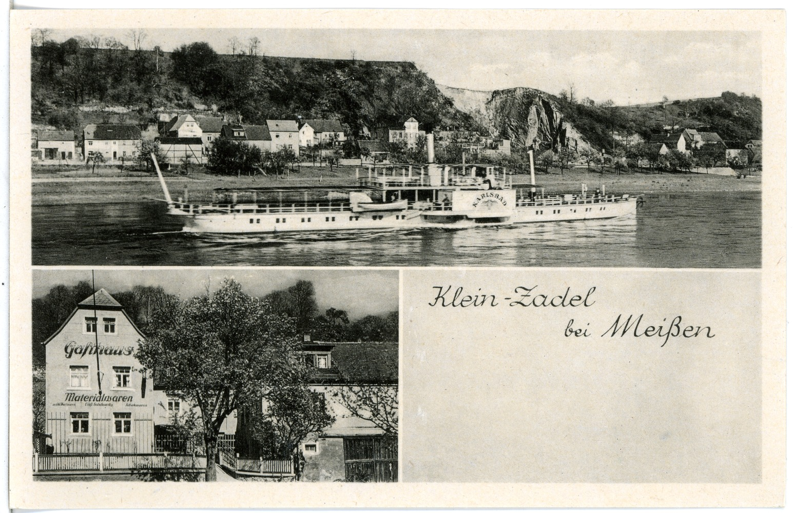 Kleinzadel; Gasthaus - Elbe mit Dampfer Karlsbad This postcard is from publisher Brück & Sohn in Meißen ( postcard has a unique number 29631 and is available in a higher resolution at the publisher. This images was uploaded in a cooperation project between Wikipedians and the publisher.